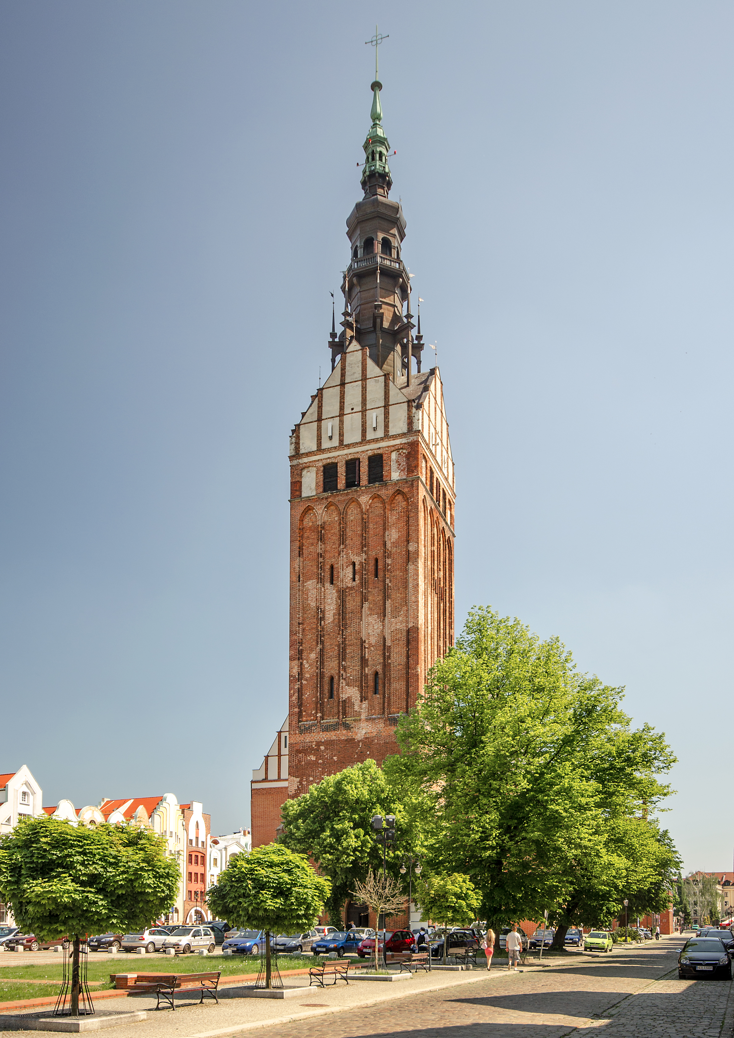 Elbląg, kościół par., ob. katedra p.w. św. Mikołaja, 1226, 1340-1380, 1953-1968